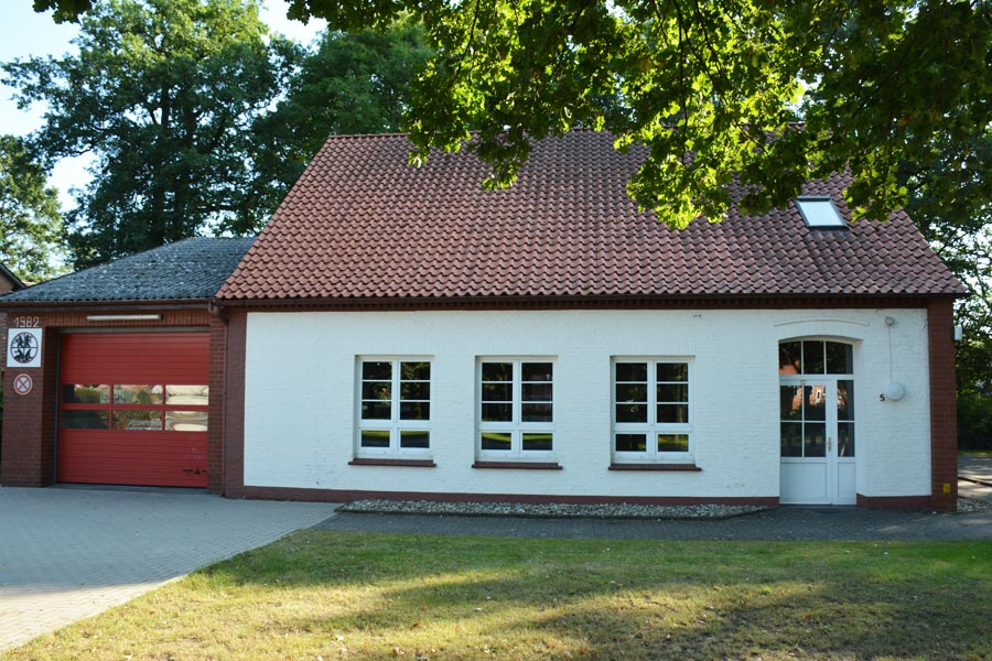 Brüttendorf Alte Schule